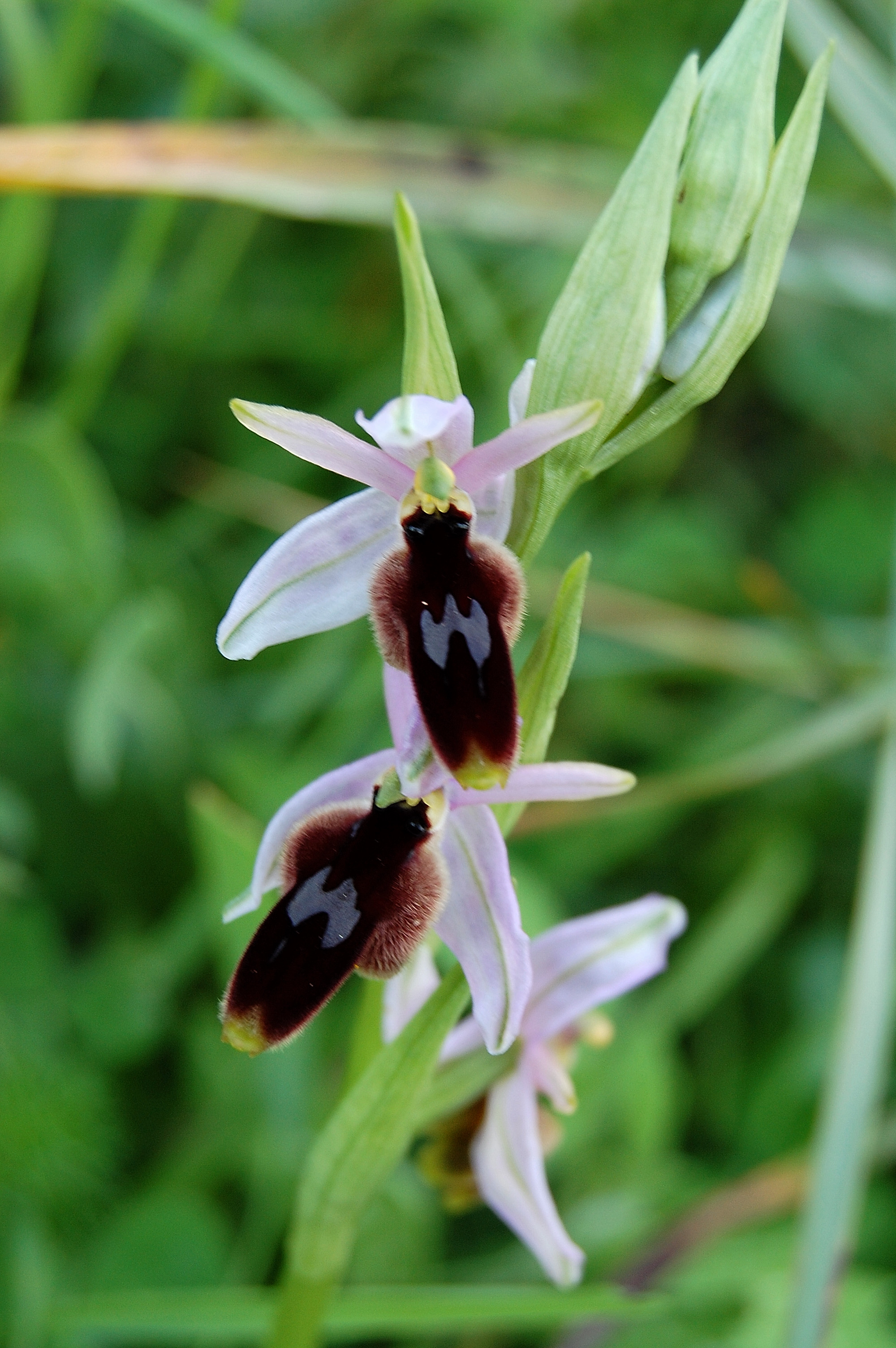 Orchidee dello Zingaro Ophrys lunulata